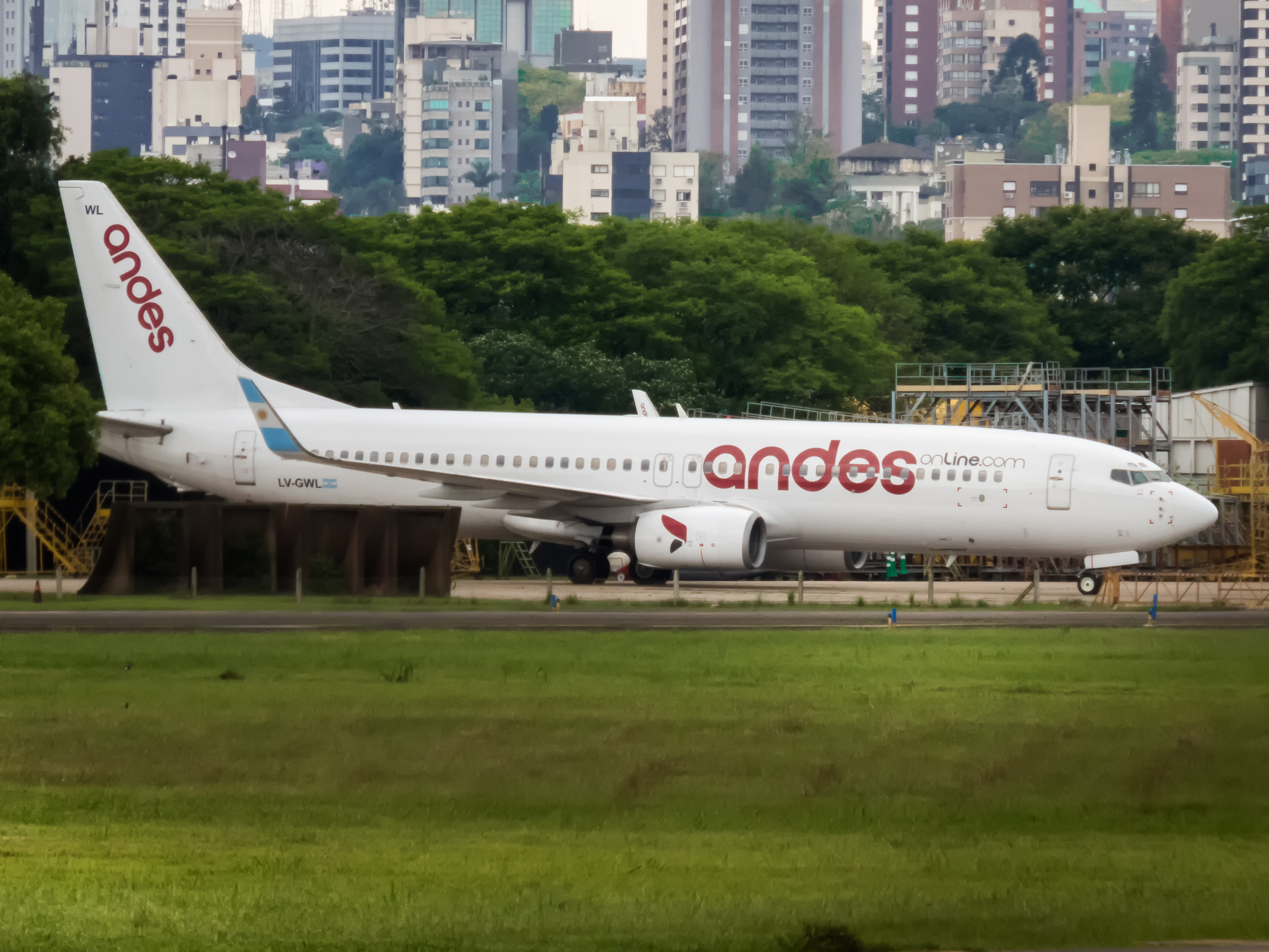 737-800 ANDES SBPA